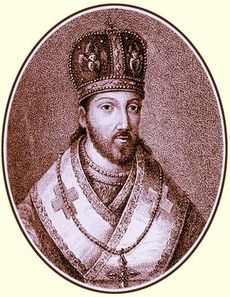 Київський митрополит Йосип Нелюбович-Тукальсикй